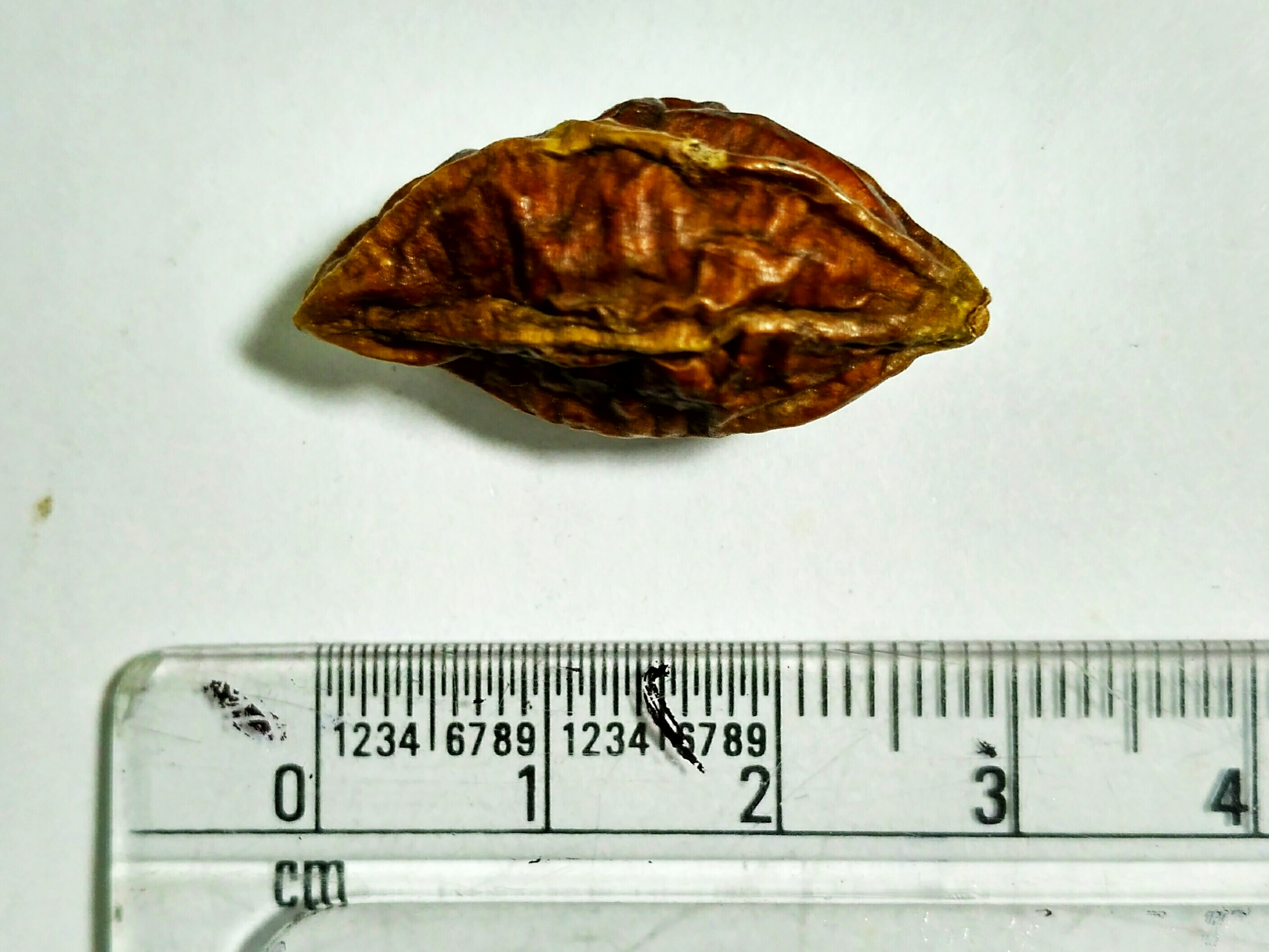 View of a dry Terminalia Chebula and a scale, Dhaka, Bangladesh, 2018. Bengali :শুকনো হরিতকী, পাশে একটি স্কেল, ঢাকা, বাংলাদেশ,২০১৮।